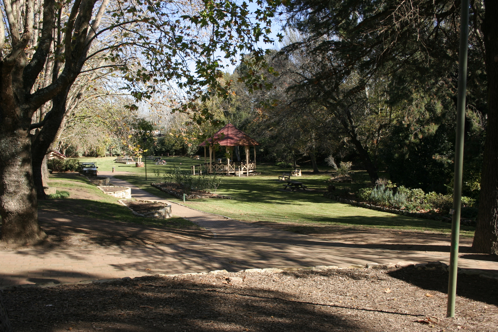 Moss Vale Leighton Gardens